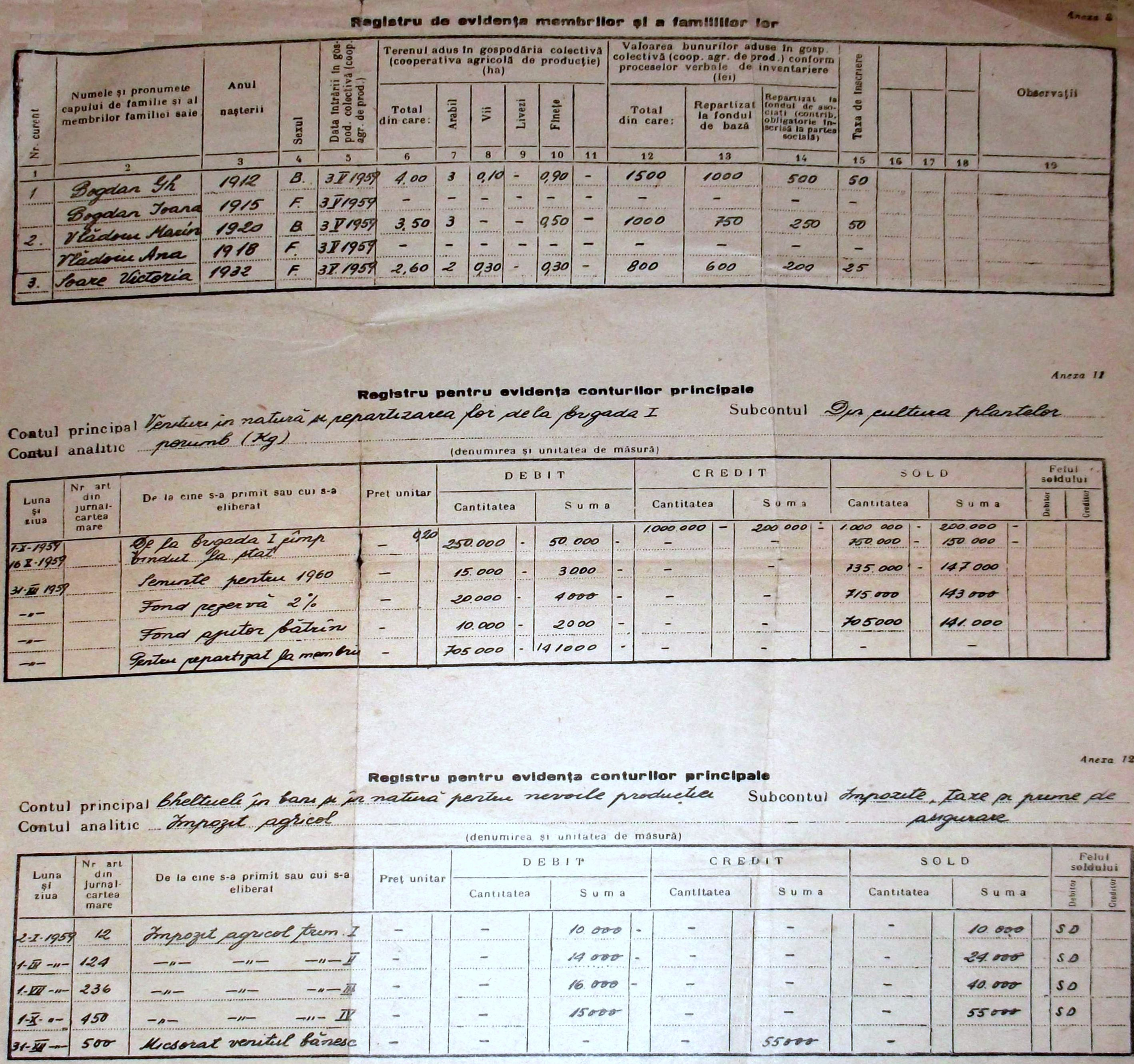 Formular cu evidenta lucratorilor la CAP , productiile obtinute si modul de repartizare a acesteia , respectiv impozitele de plata la veniturile realizate - arhiva fam.Tare Vasile din Aruncuta ,jud.Cluj